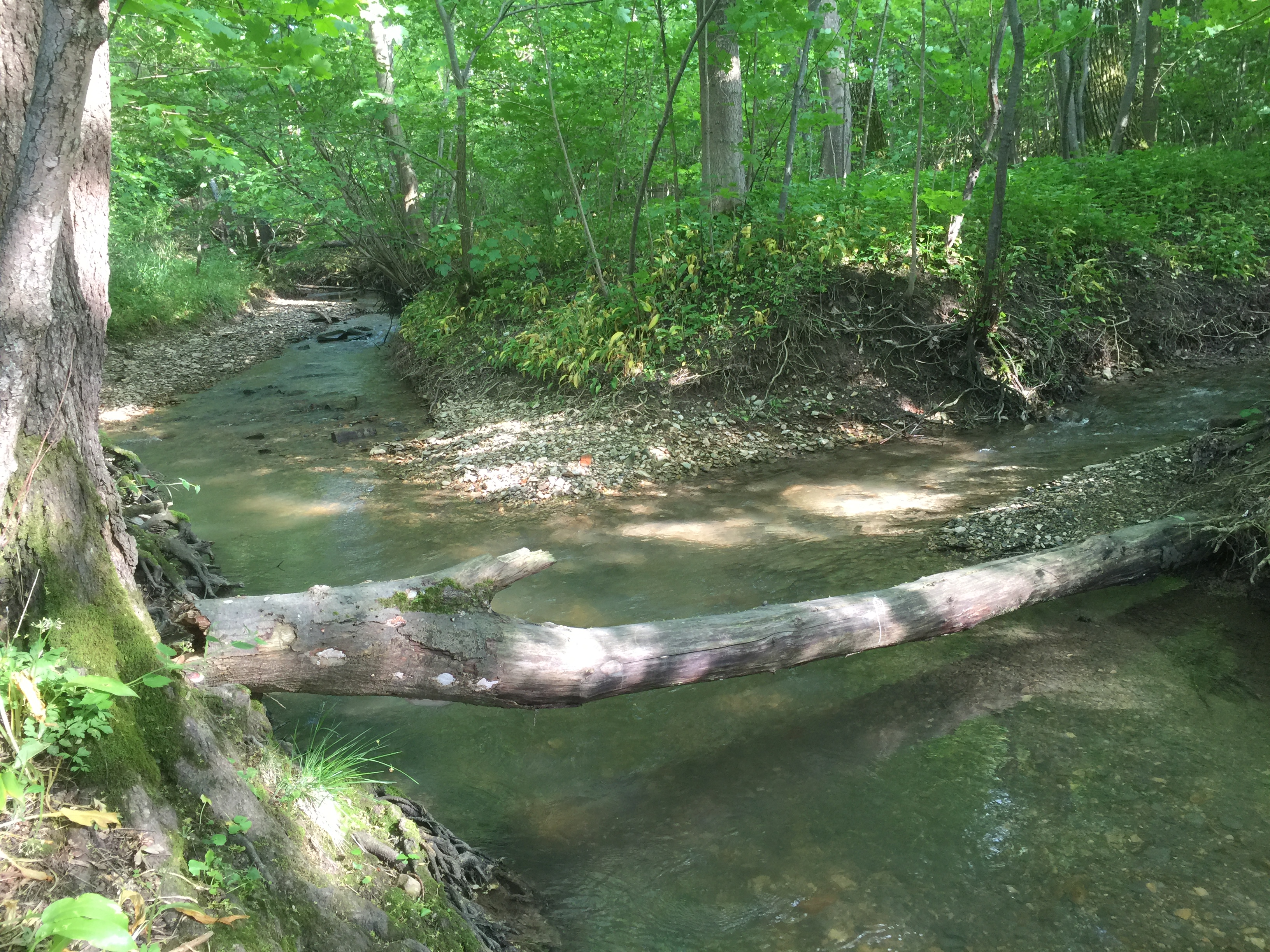 Zellerbach, Mündung in den Reichenbach.